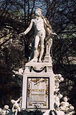 mozart denkmal, wien; eigen foto